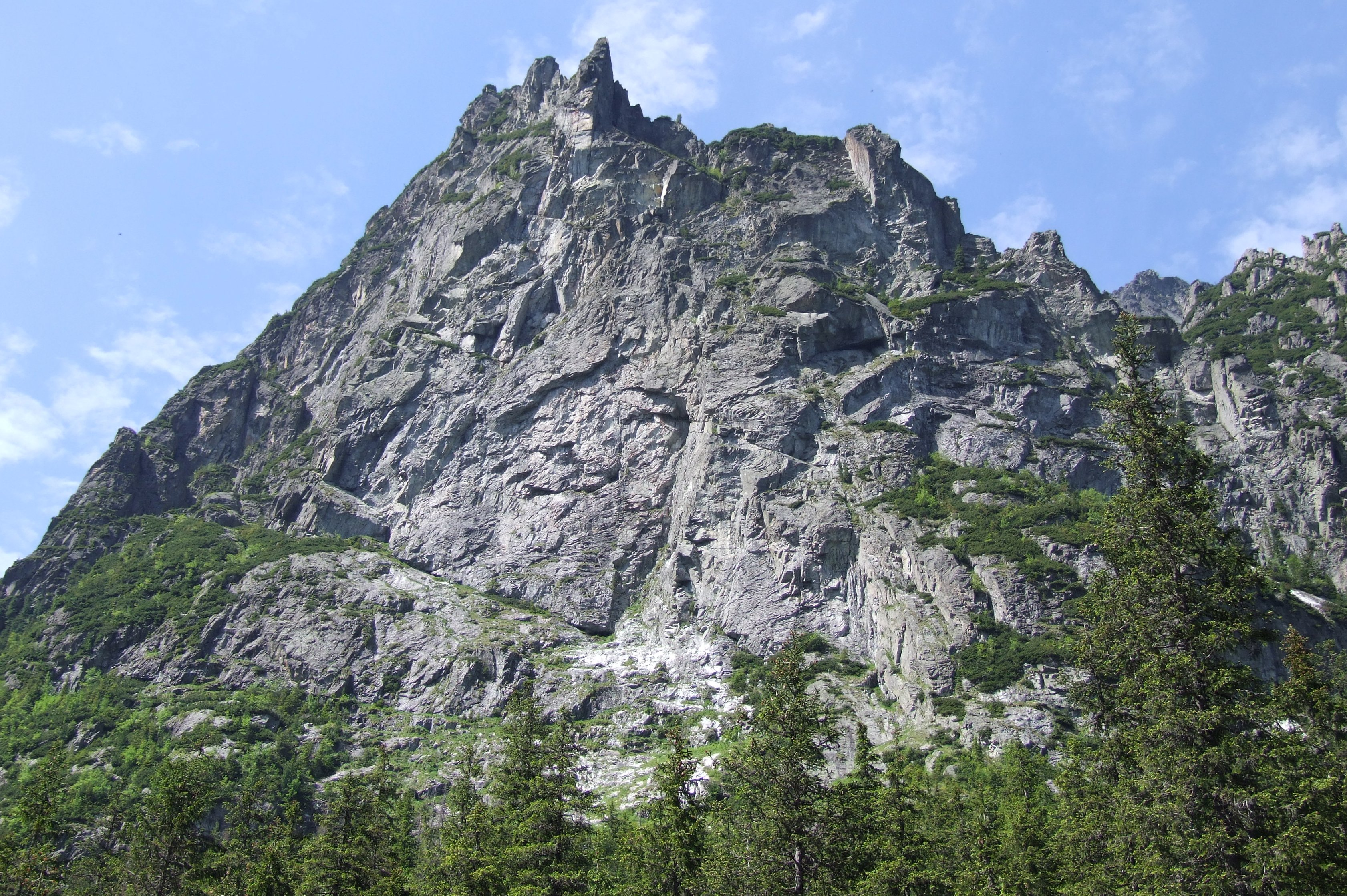 Mlynárik (Młynarczyk) w Dolinie Białej Wody